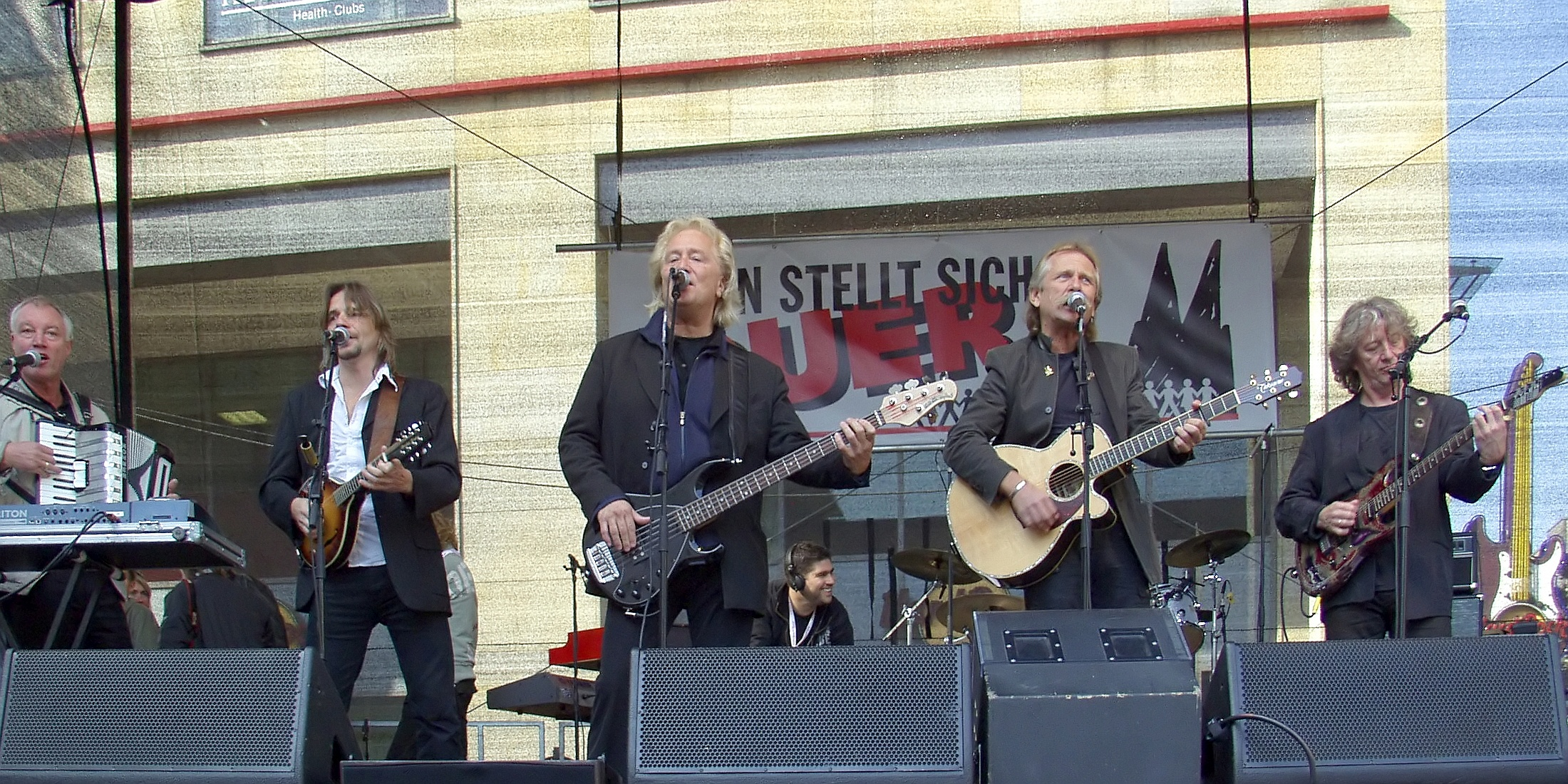 „De Höhner“ auf der politischen Demonstration „Köln stellt sich quer“ gegen den so genannten „Anti-Islamisierungskongress“ der rechtsgerichteten Partei „Pro Köln“ vor dem Gürzenich in Köln.